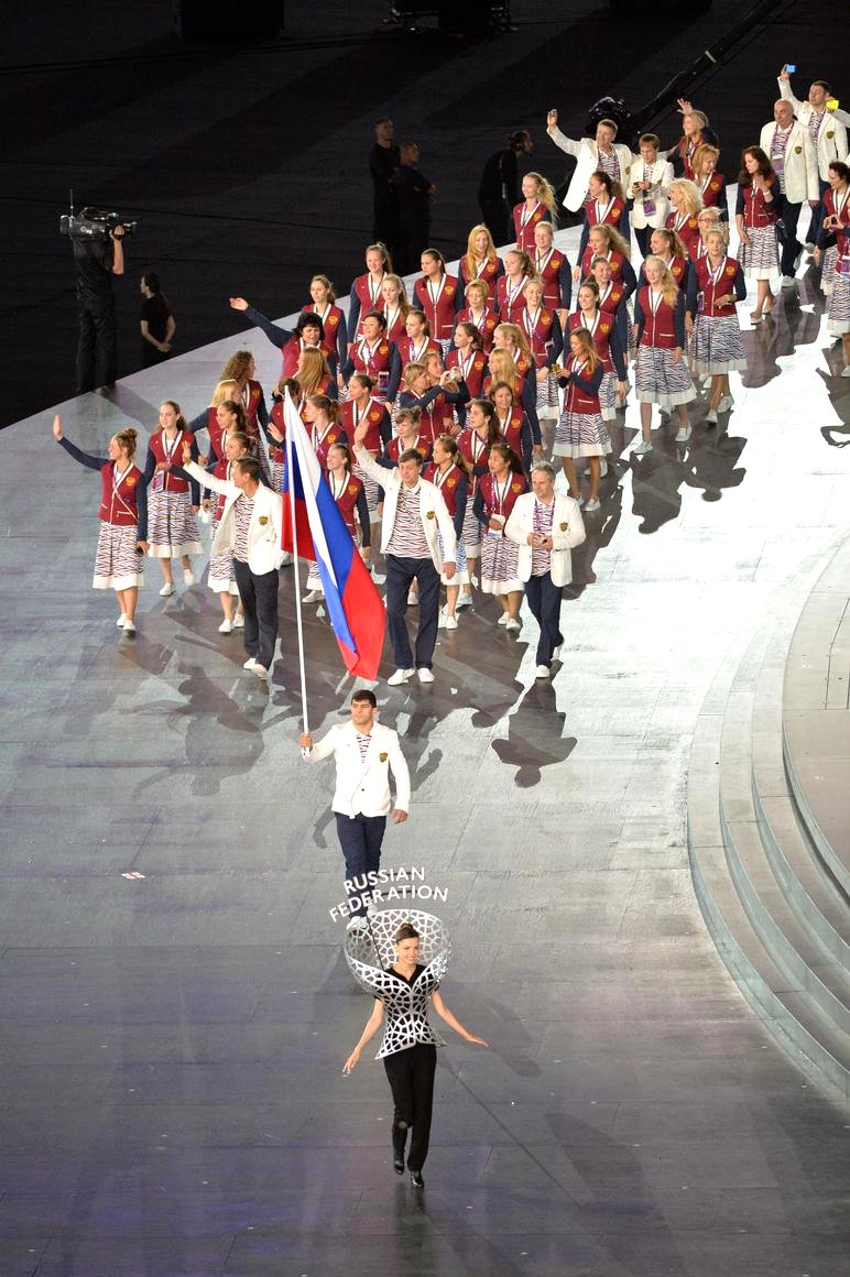 Российская сборная на церемонии открытия Первых Европейских игр в Баку. Знаменосец Хаджимурат Гацалов.